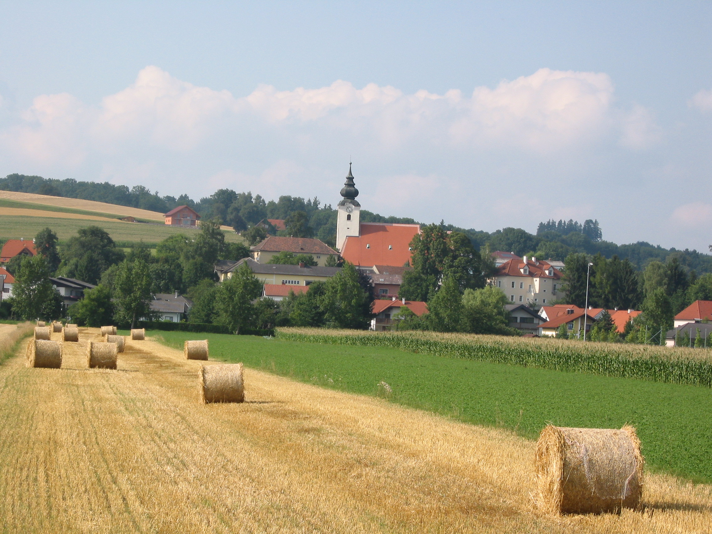 St. Georgen am Ybbsfelde, vom Süden gesehen, zur Erntezeit. Der Mais steht noch auf den Feldern.